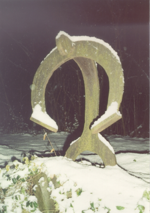 Eisenmann-Plastik vom Künstler Walter Bischof